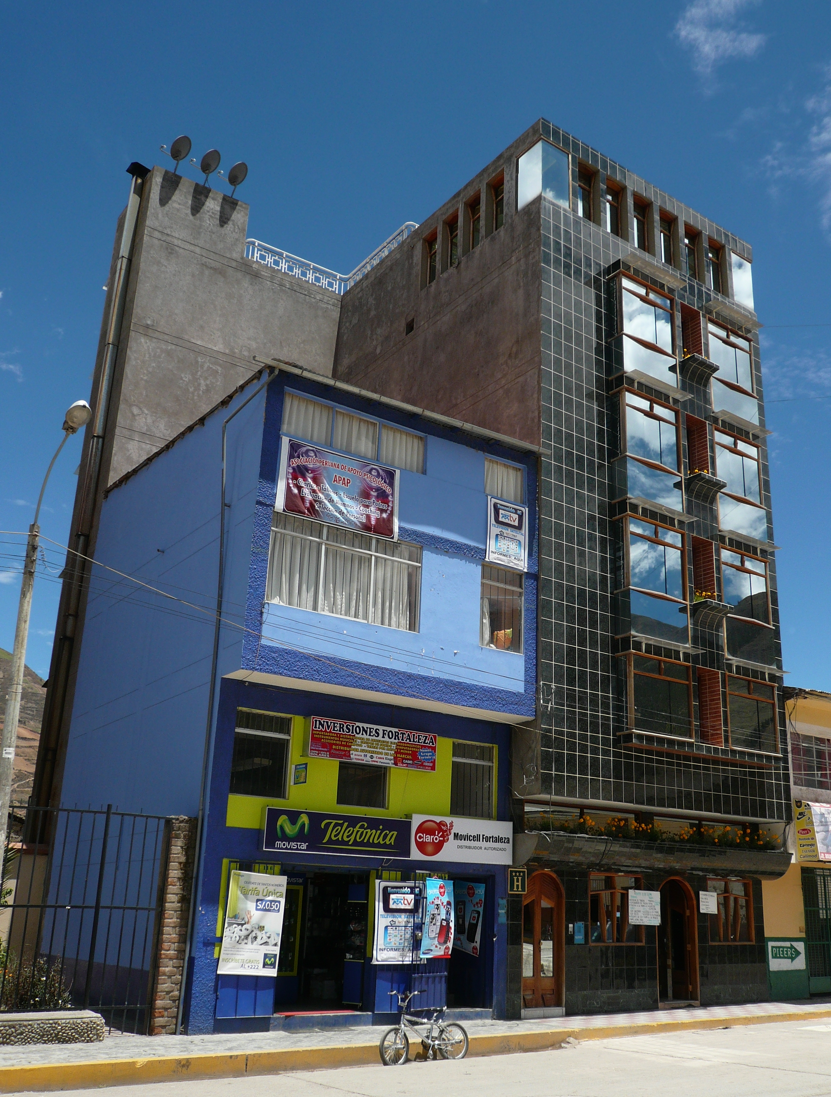 Empresa hotelera y de servicios telefonicos (celulares) en plena plaza de Pampas.